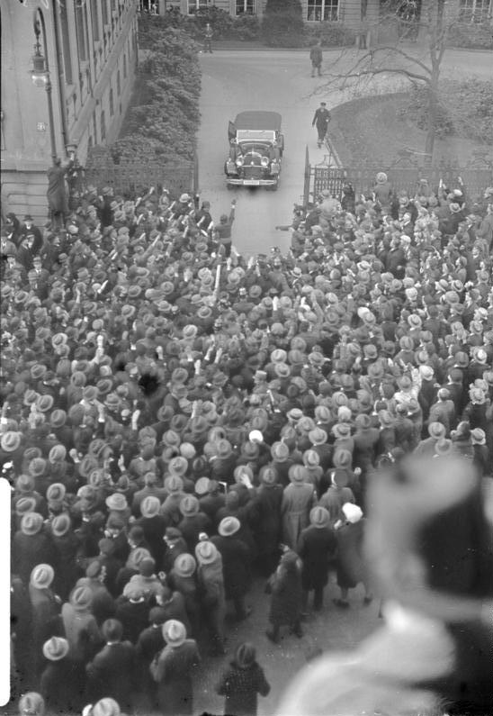 This description has been identified as biased or incorrect: Einleitungssatz zeitgenössischer POVEin interessanter Rückblick auf das ereignisreiche Jahr der nationalen Erhebung in Deutschland, vom 30. Januar 1933 bis jetzt! Der historische 30. Januar 1933 in Berlin. Adolf Hitler wurde vom Reichspräsidenten von Hindenburg zum Reichskanzler ernannt. Das Auto mit Reichskanzler Adolf Hitler verläßt um 12 Uhr 40, von der jubelnden Menschenmenge begrüßt, die Reichskanzlei, dem damaligen Sitz des Reichspräsidenten in der Wilhelmstrasse.